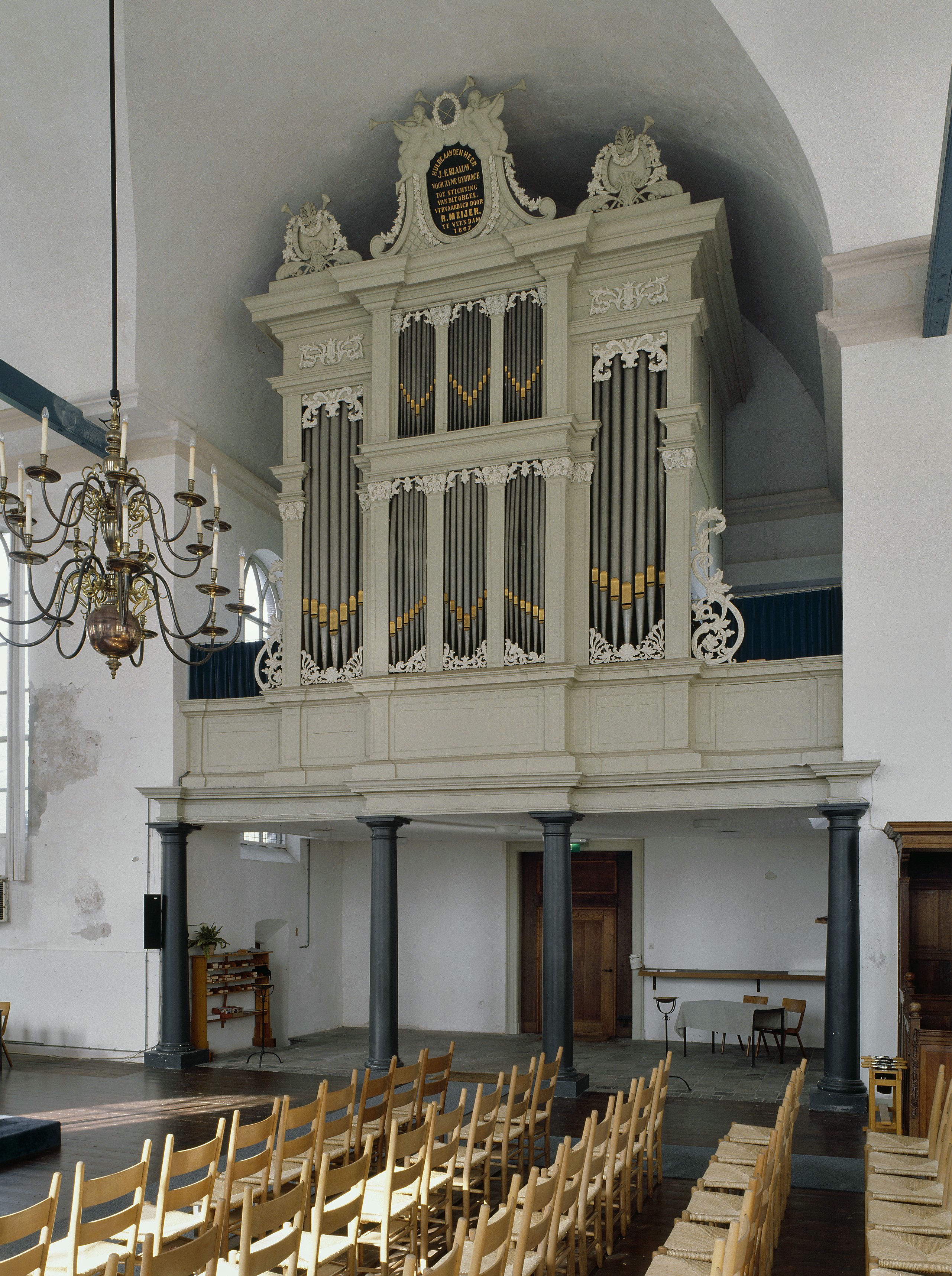 Nederlands Hervormde Kerk: Interieur, aanzicht orgel, orgelnummer 1672 (opmerking: Gefotografeerd voor Het Historische Orgel in Nederland 1865-1872)